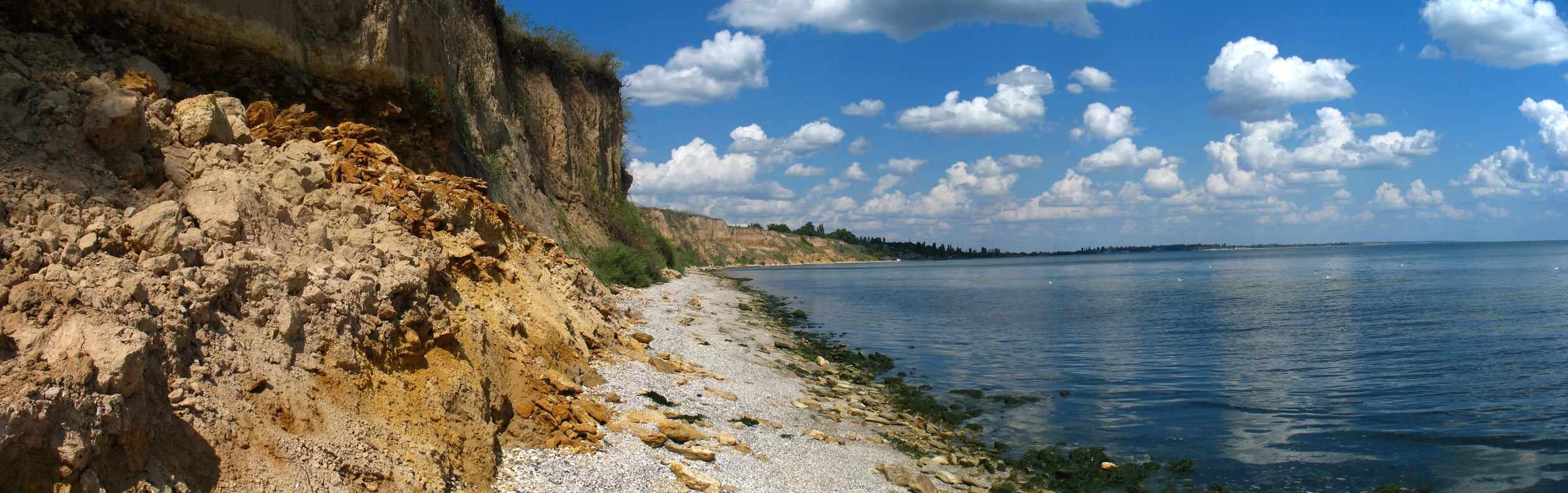 Rybakivka resort